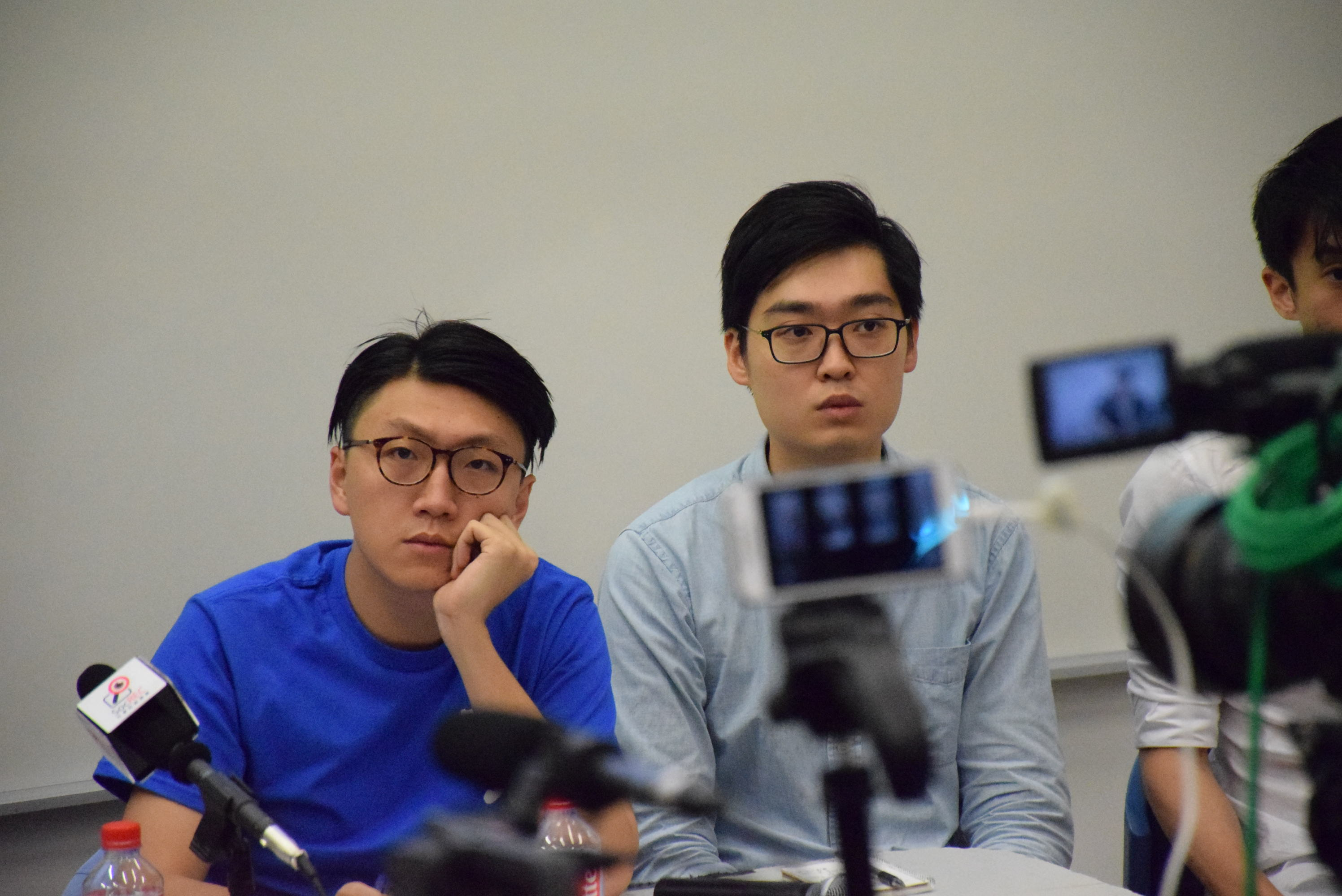 本土民主前線發言人梁天琦(左)與香港民族黨召集人陳浩天。（美國之音湯惠芸攝）